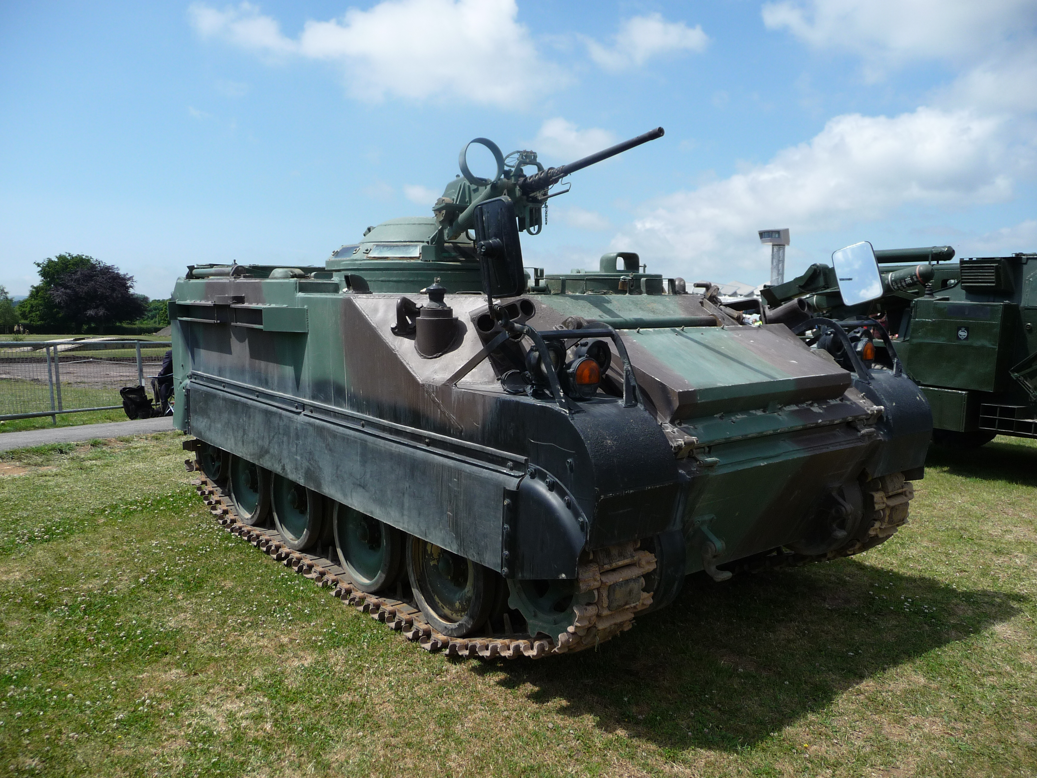 APC